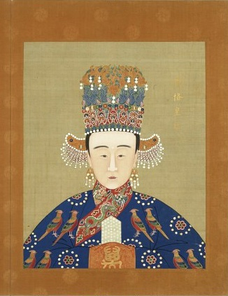 中文（中国大陆）: 作者已经去世超过200年，作品已经进入公有领域。